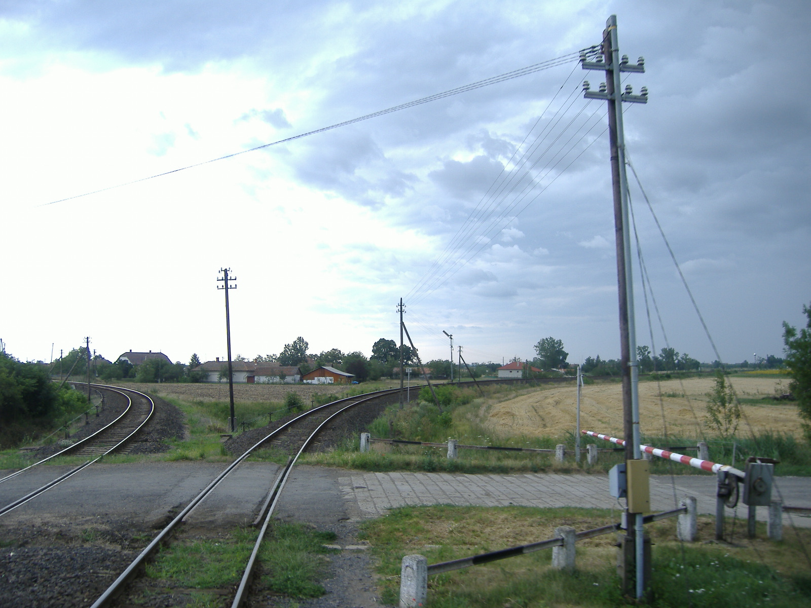 A 127-es vasútvonal Dévaványa előtti és utáni szakaszának „elágazása". Balra a Szeghalom, jobbra a Gyoma felé tartó sínpár látható.